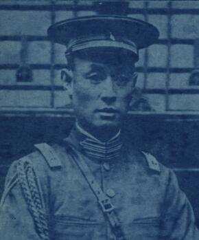 冷寅东（1894年－1982年10月11日），字薰南，四川省大邑县灌口场人。中华民国军事将领、中华人民共和国政治人物。